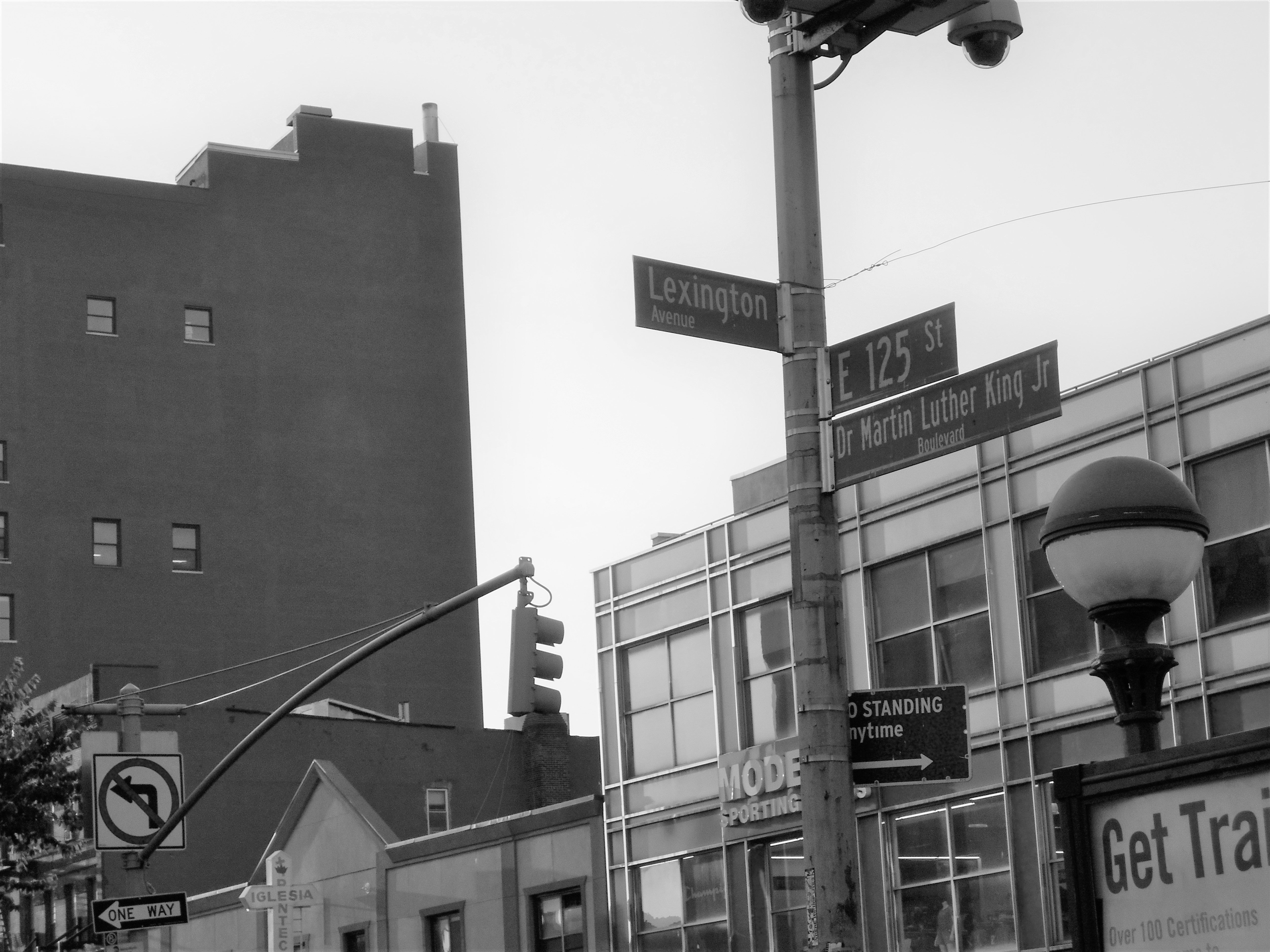 Straßenschild Lexington Ave. Ecke 125th Street, Harlem, New York City